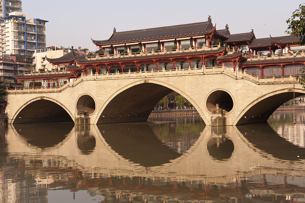 九孔桥&安顺廊桥2012-03成都-_DSC0208-web